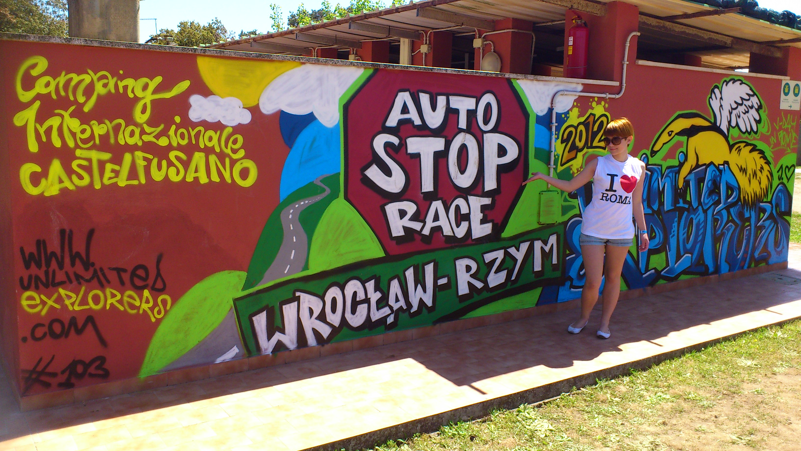 Graffiti Auto Stop Race 2012 znajdujące się na campingu we włoskim Lidio di Ostia